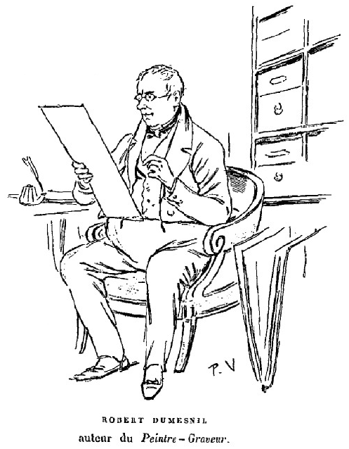 Portrait d'Alexandre-Pierre-François Robert-Dumesnil paru dans L'Art et l'idée, 1892, p. 183.